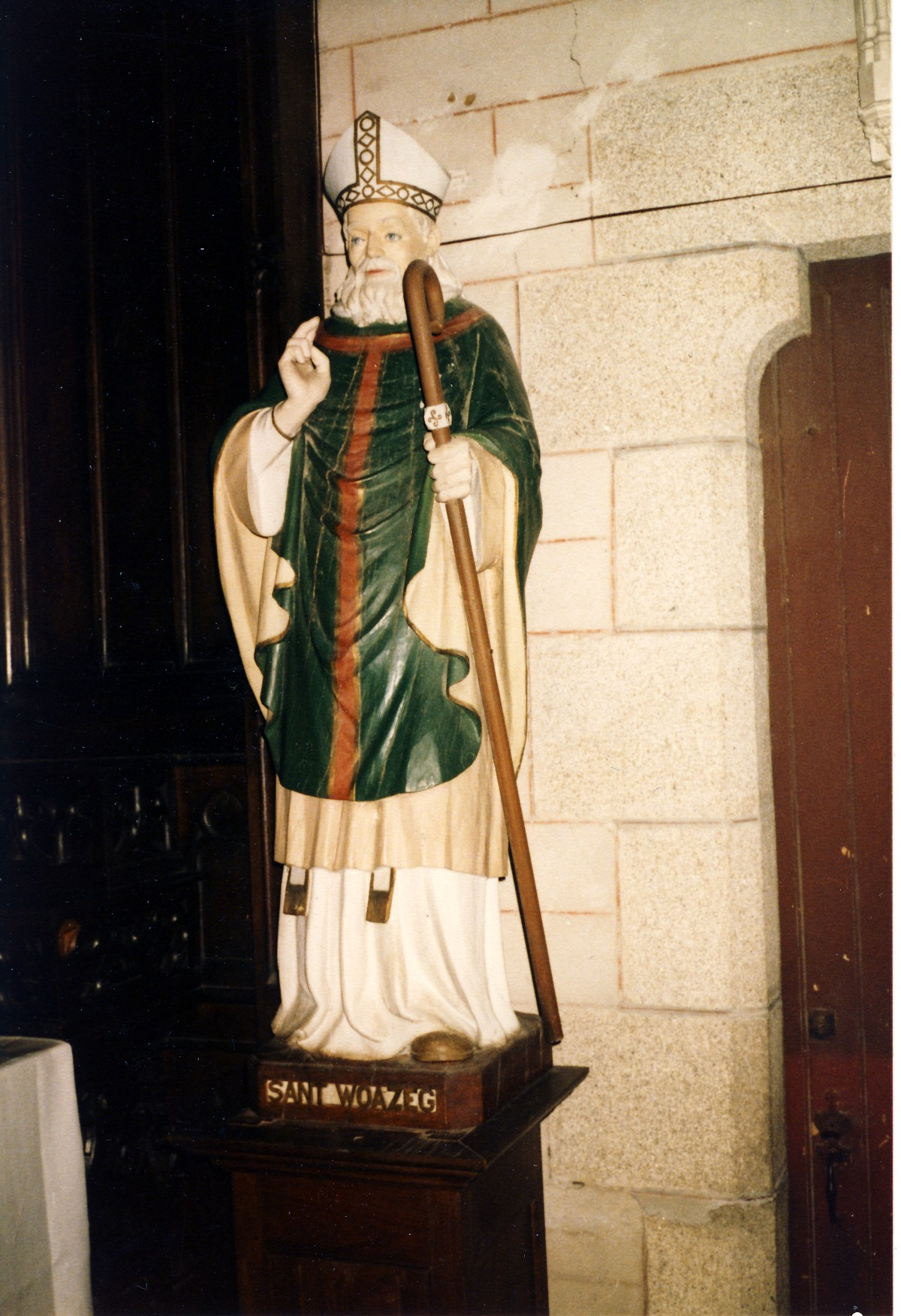 Un delwenn eus Sant Gwazeg kizellet gant an Ao.Youenou, breur-kaer Fransez Debauvais, breur e wreg Anna Youenou.